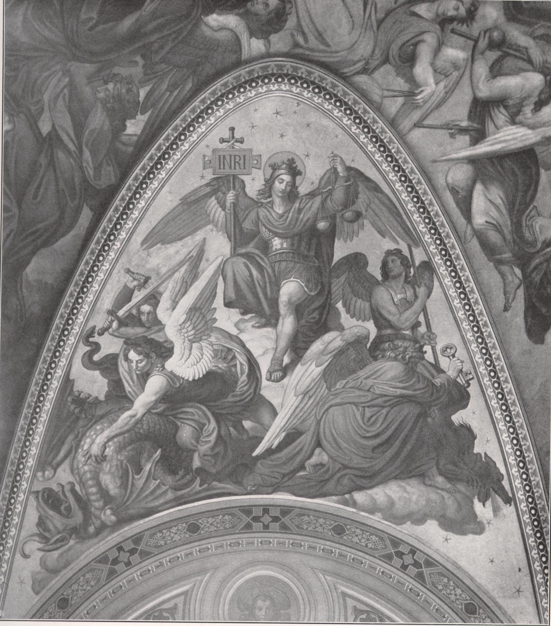 Peter von Cornelius, Fresko in St.-Ludwig-Kirche in München. Druck